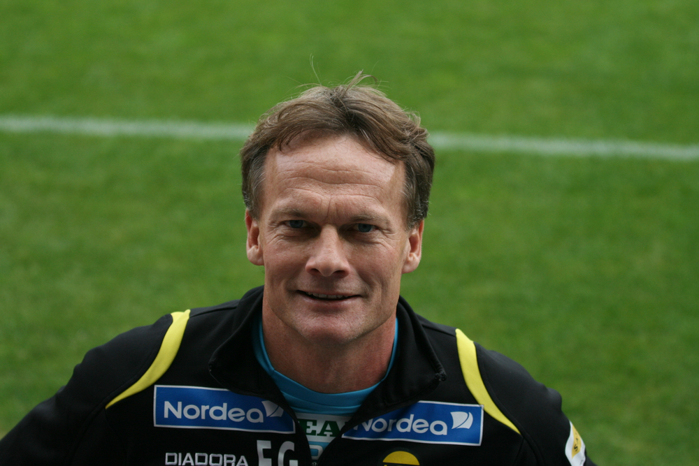 Frode Grodås